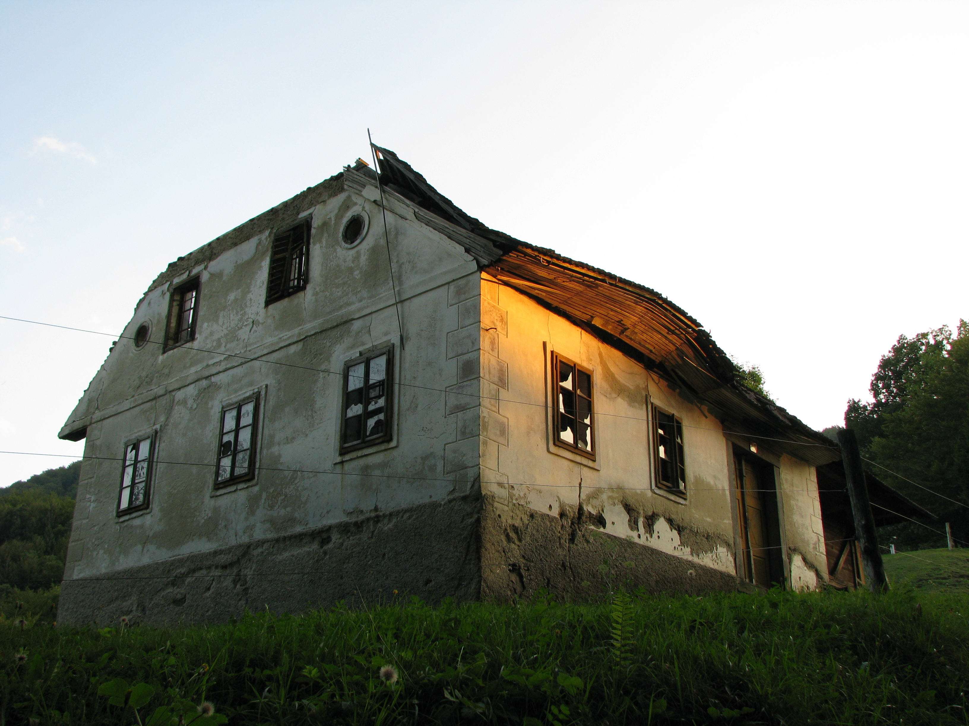 Zavrh pri Trojanah, hišna številka 7